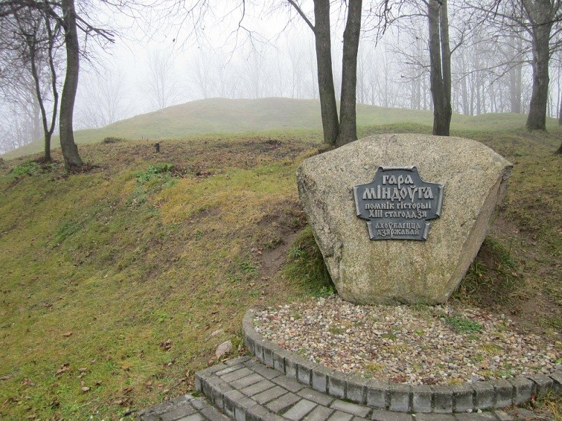 Беларуская (тарашкевіца): Гара Міндоўга з тэрыторыяй. Наваградак This is a photo of Belarusian heritage monument. Reference number: 412В000387 ( WLM)